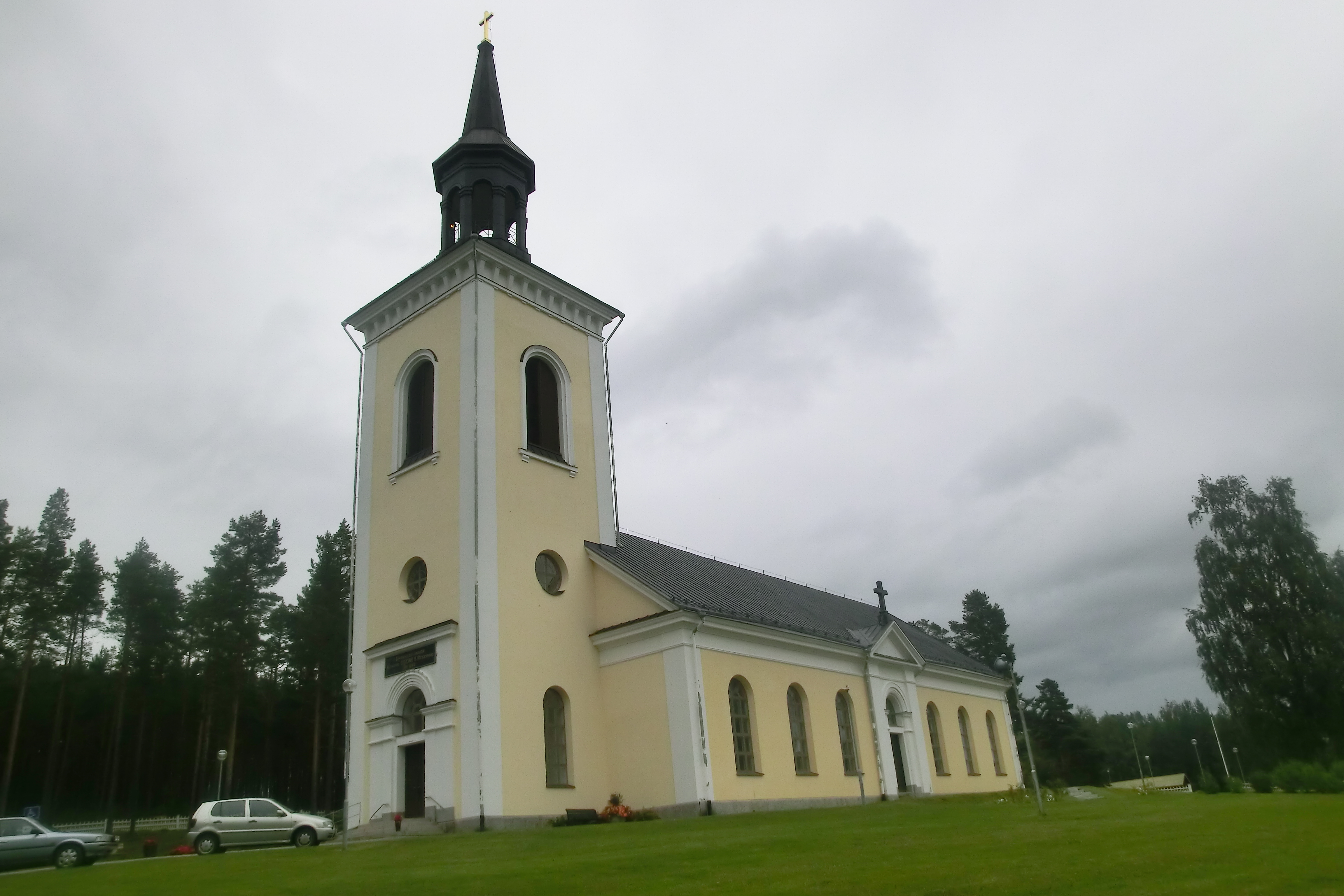 Junsele kyrka